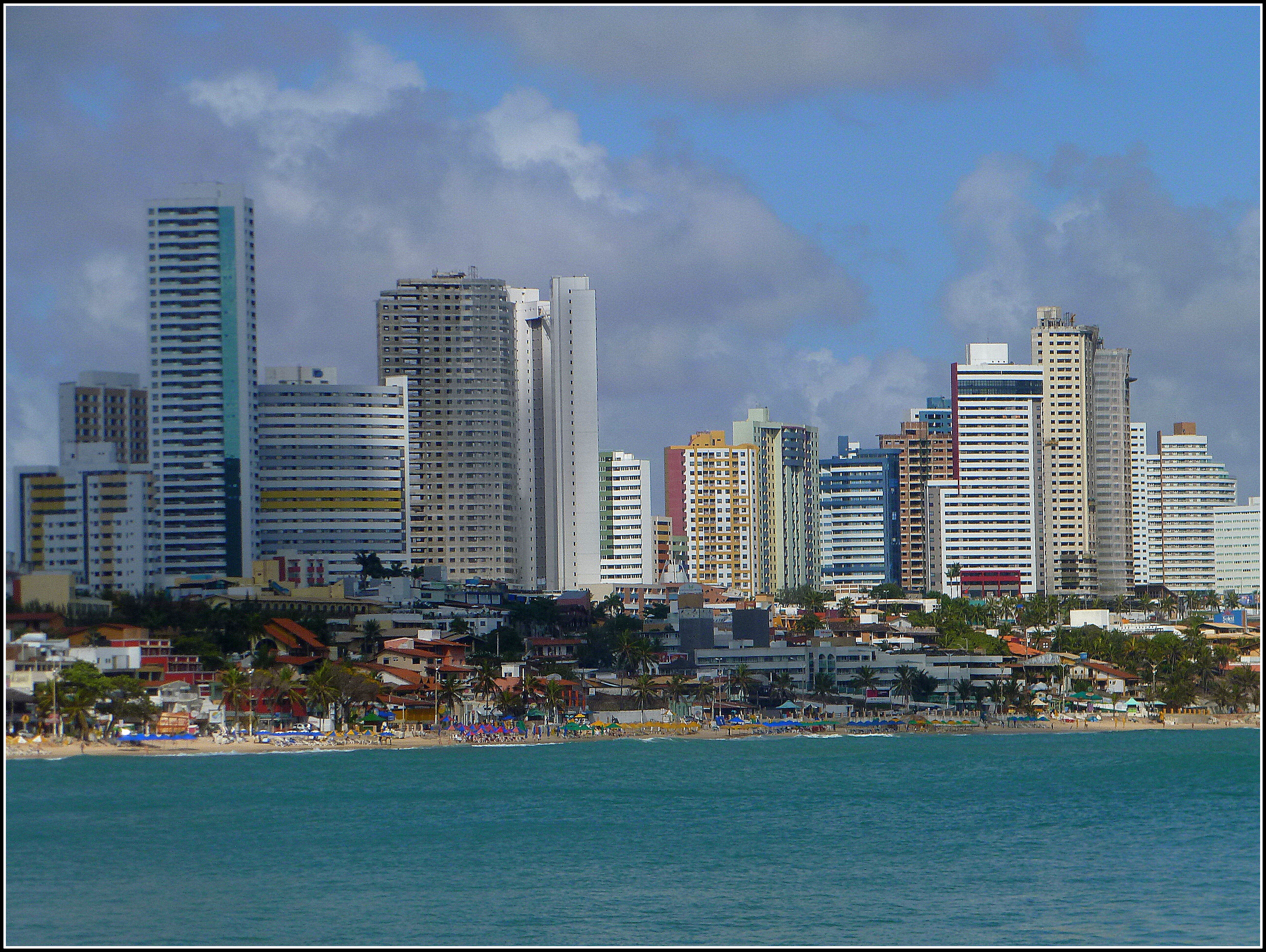 Natal RN